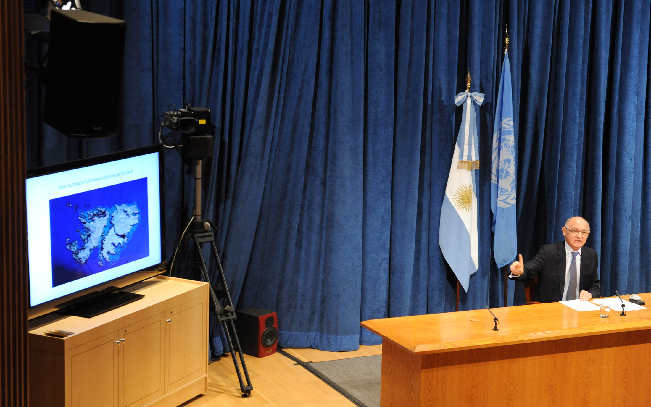 Nueva York,10 de febrero de 2012. El canciller argentino, Hector Timerman durante la conferencia de prensa en la ONU.